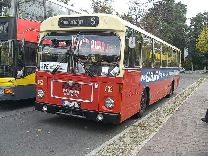 MAN SL 192 der infra Fürth (Museumsfahrzeug)